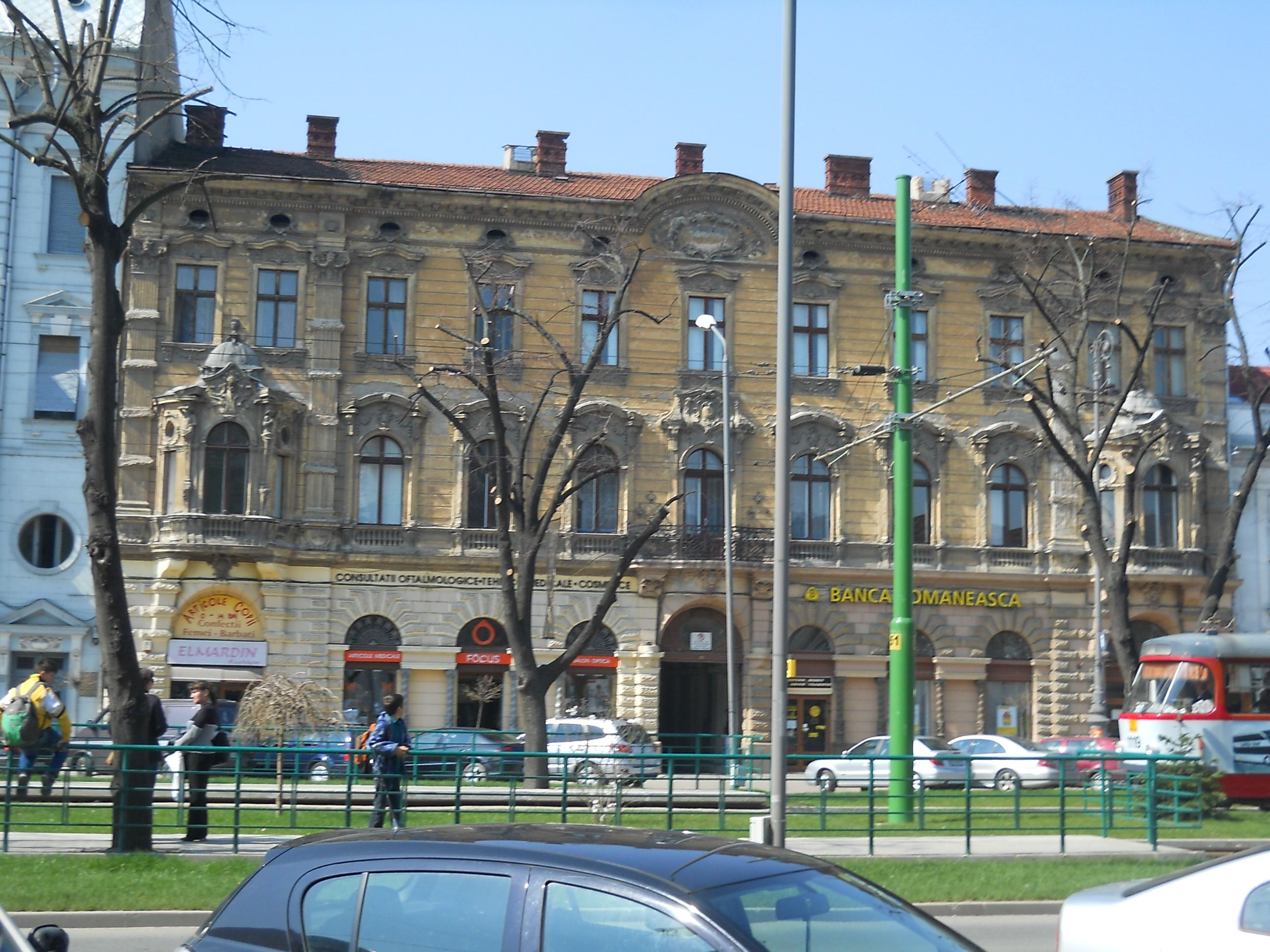 Vedere de pe celalalt trotuar. Imagine de ansamblu